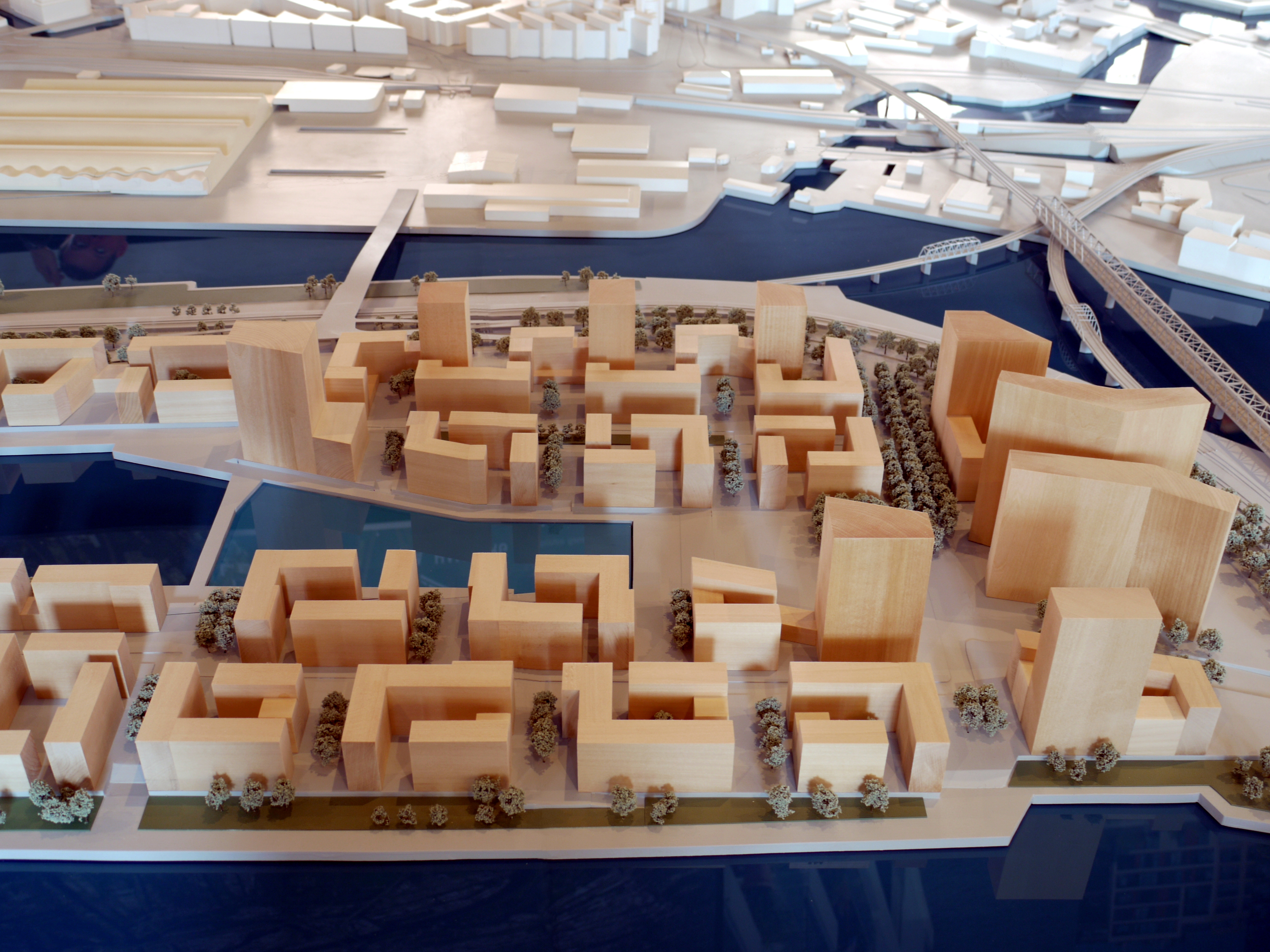 Modell der zentralen Freiraumanlagen im Quartier Elbbrücken in der HafenCity in Hamburg.